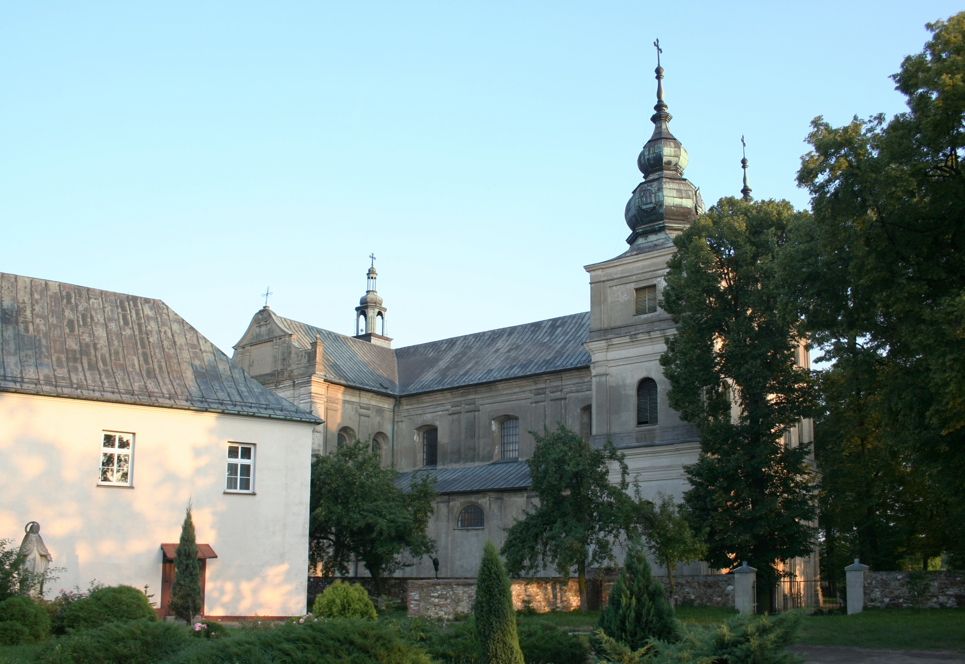 Klasztor kanoników regularnych i plebania w miejscowości Wancerzów, gmina Mstów